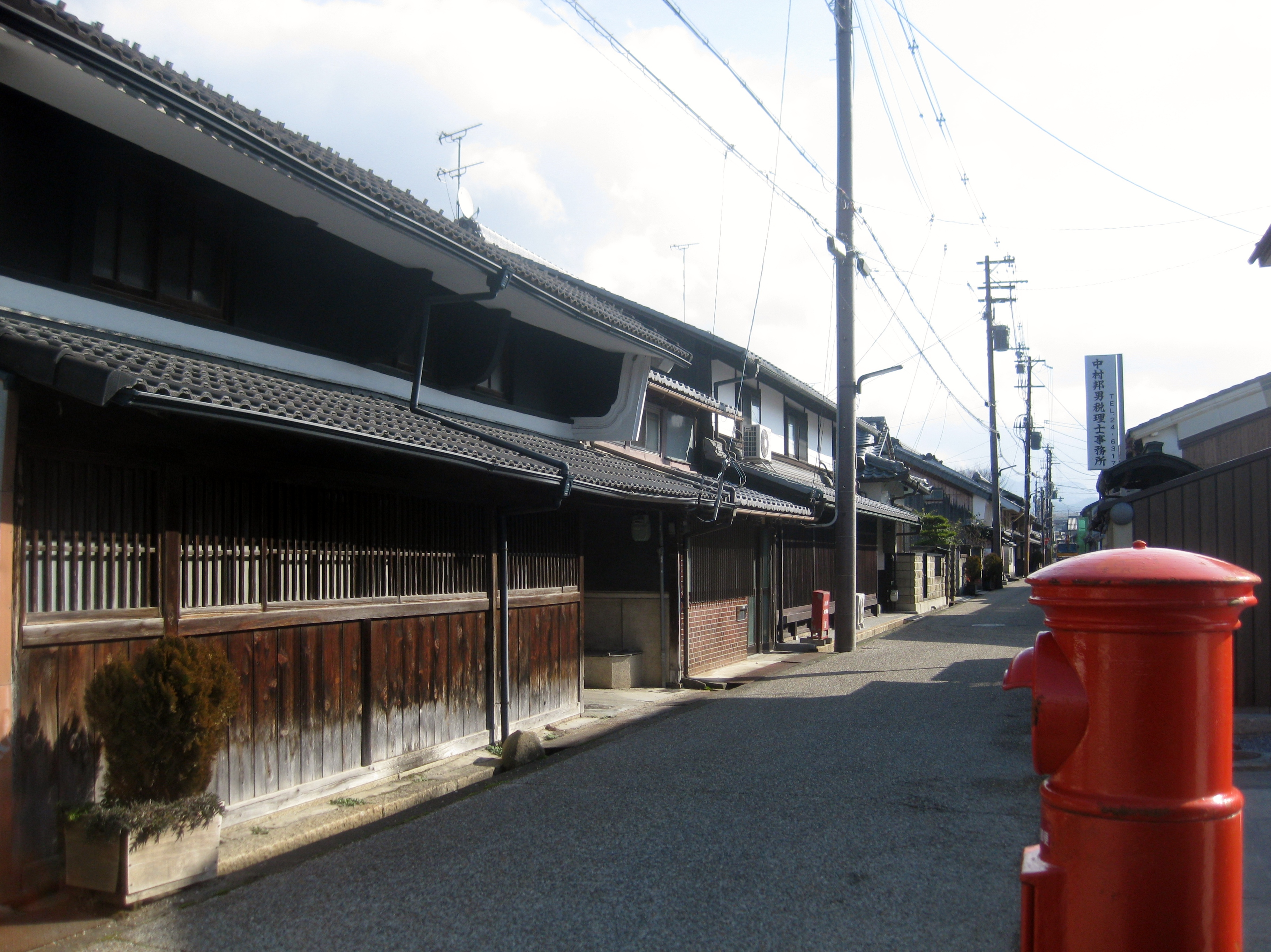 滋賀県彦根市城町の町並み。